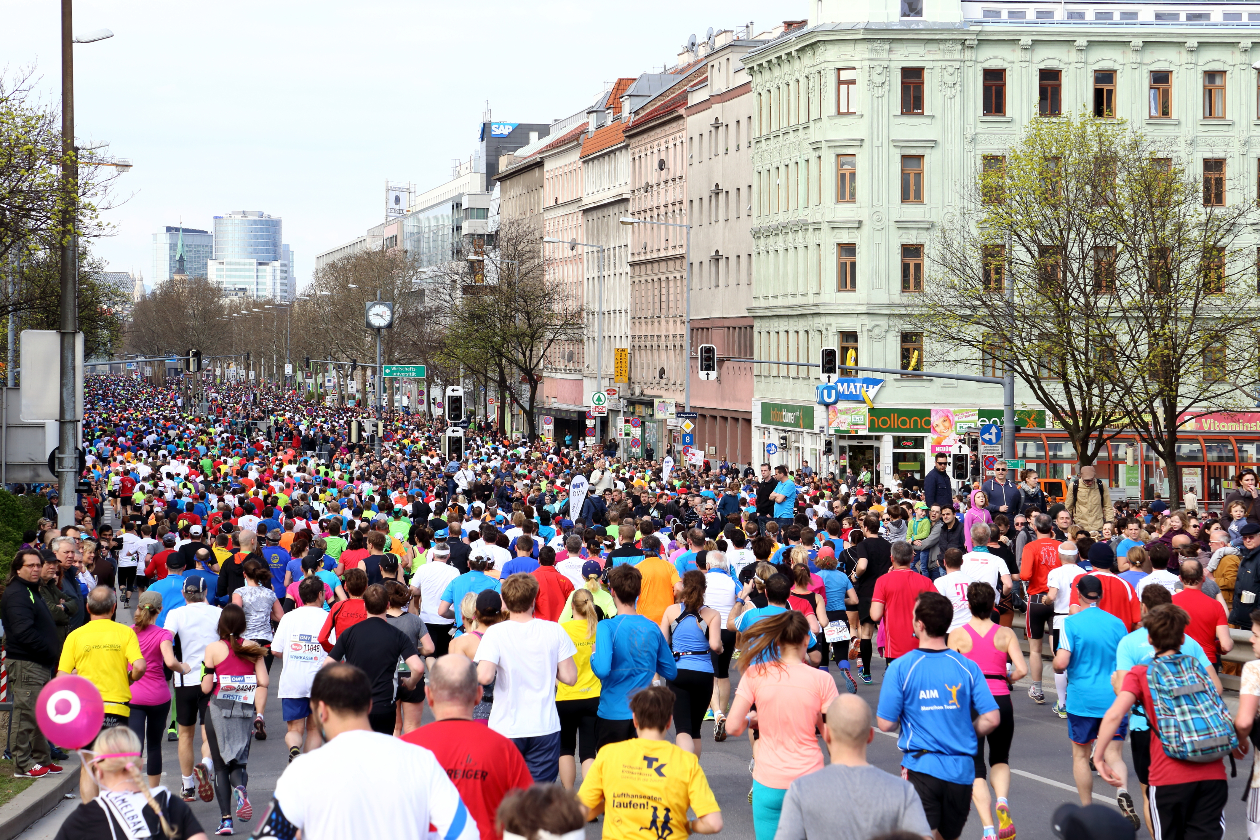 Läufer des 32. Vienna City Marathon im Bereich Lassallestraße. Insgesamt gab es 42.742 Anmeldungen aus 129 Nationen (Marathon 9.064, OMV Halbmarathon 16.145, Stadion Center Staffel Marathon 14.576 (=3.644 Teams), Coca-Cola 4.2 1.580, Coca-Cola 2.0 1.377). Sieger wurde der Äthiopier Sisay Lemma mit einer Zeit von 2:07:31 Stunden.